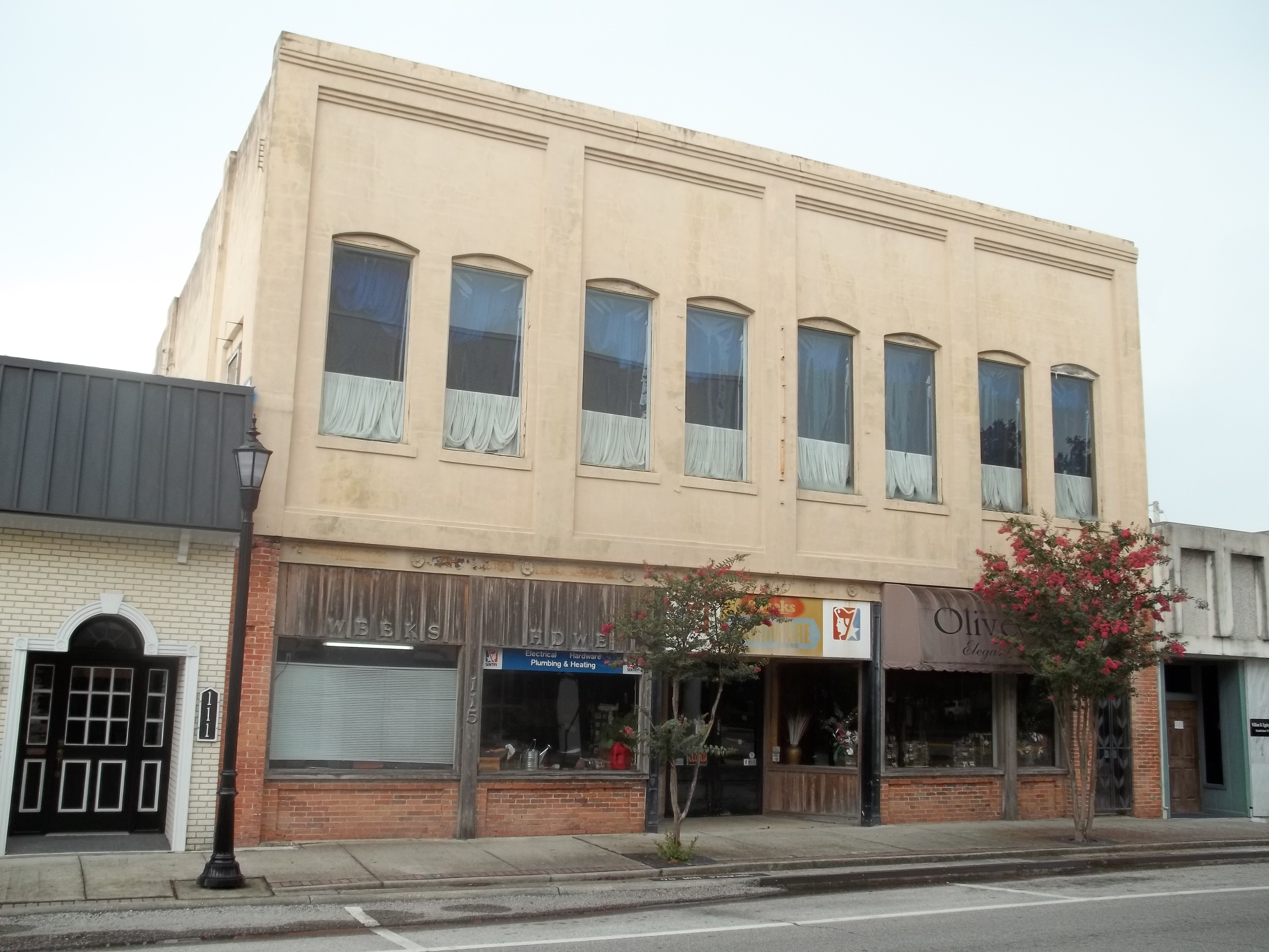 Brooksville, Florida: Weeks Hardware